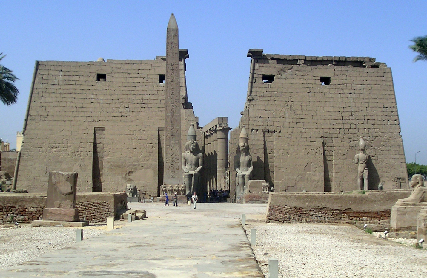 Vue du dromos et du pylône du temple de Louxor